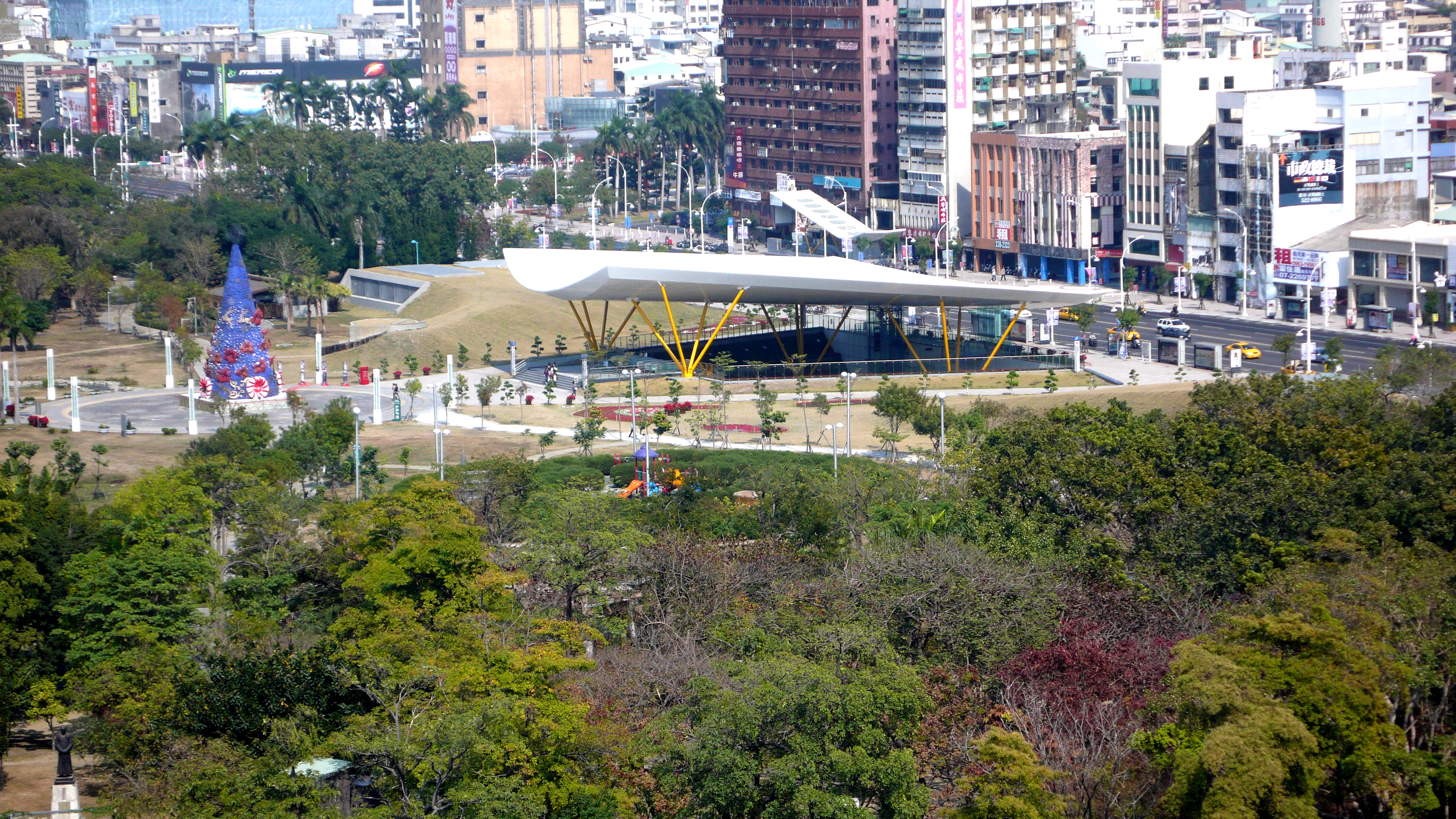 2009年1月25日，高雄大立百貨北海道展，自大統精品樓頂風景展望台眺望高雄捷運中央公園站。